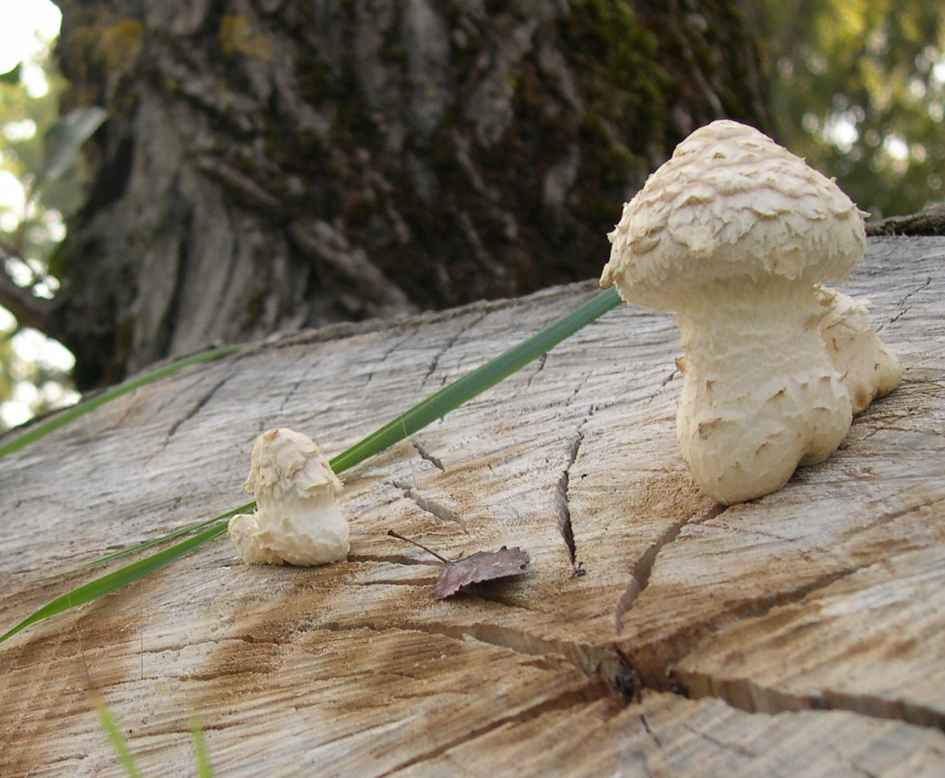 Pholiota destruens syn. Pholiota populnea